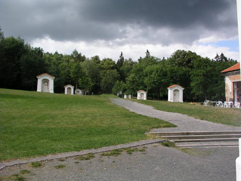 Křížová cesta na Skalce